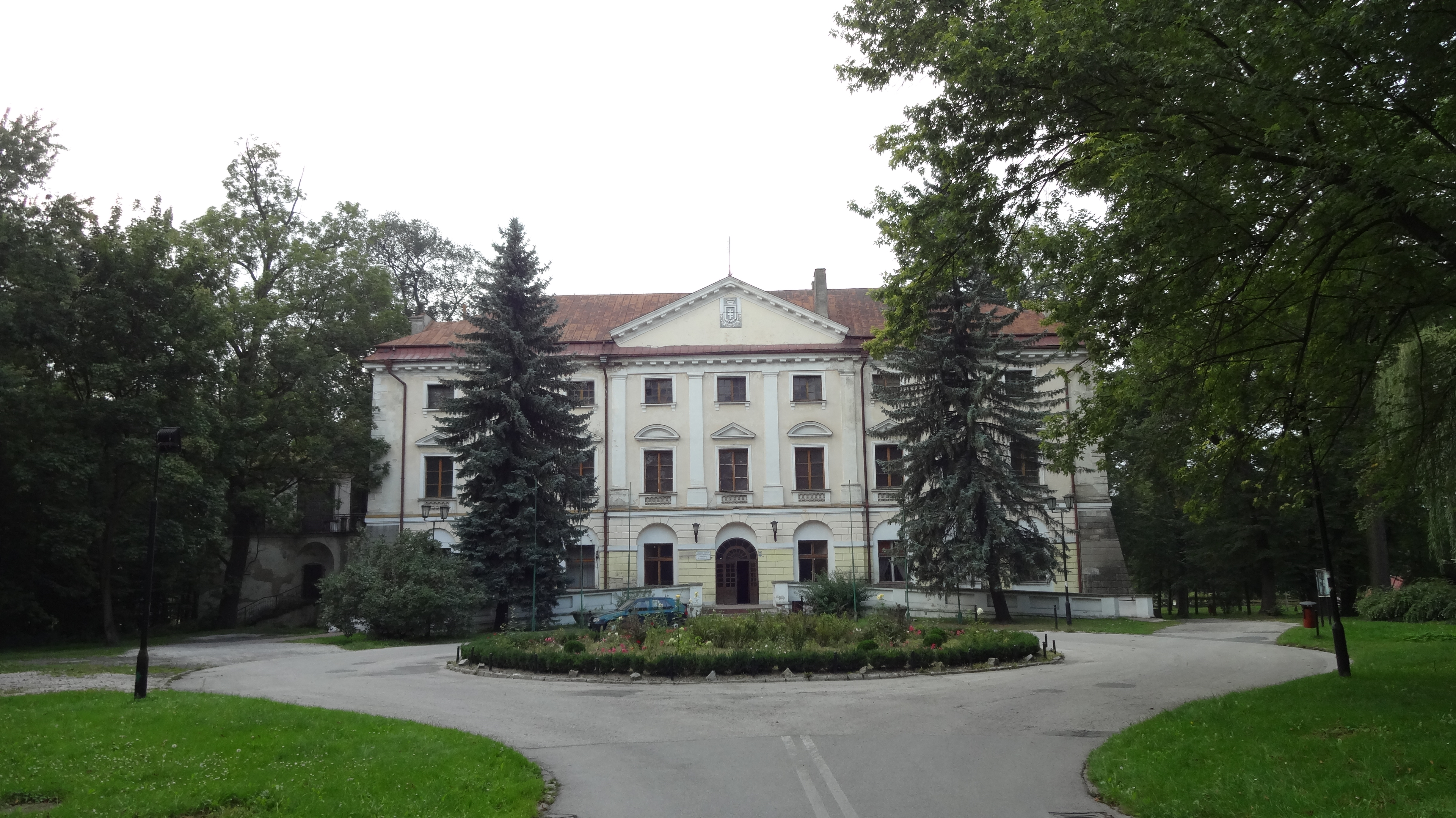 pałac w Koniecpolu (powiat częstochowski) od strony frontowej 01.197.